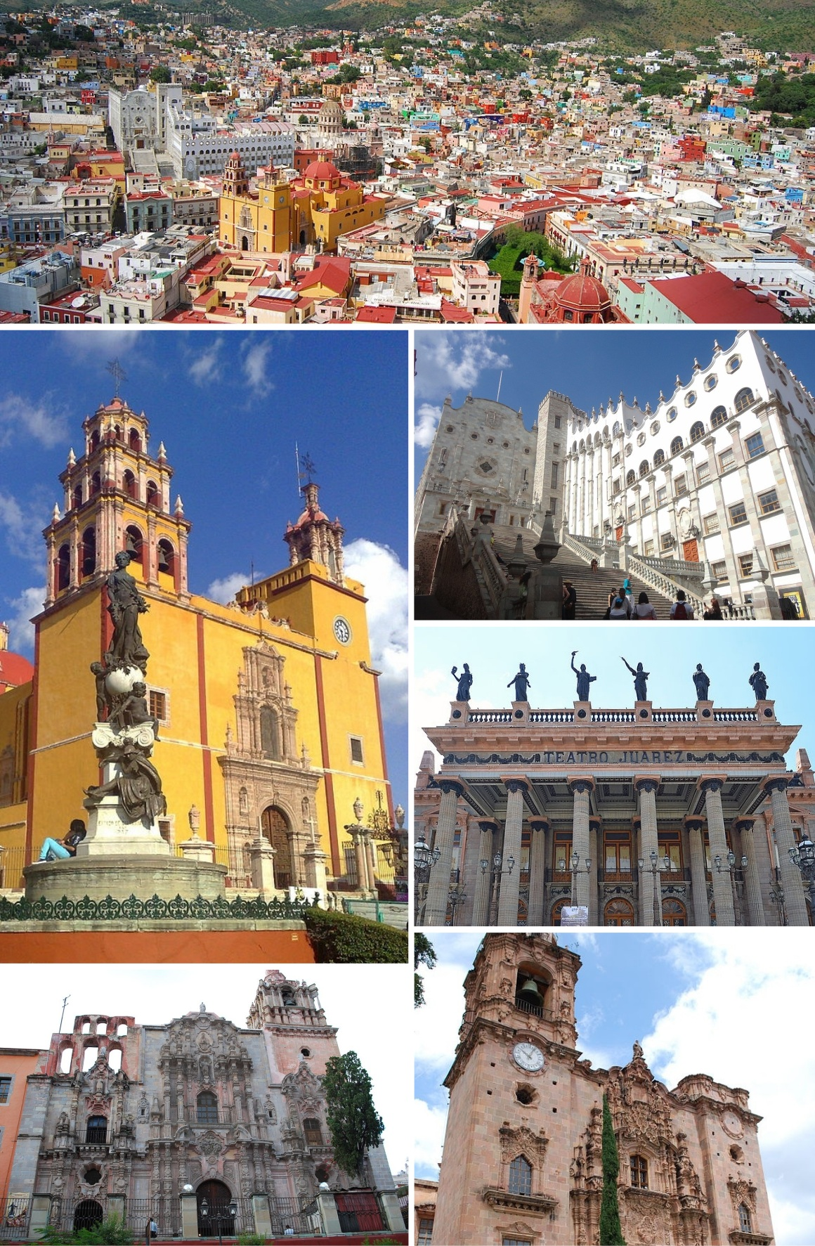 Guanajuato (Guanajuato)